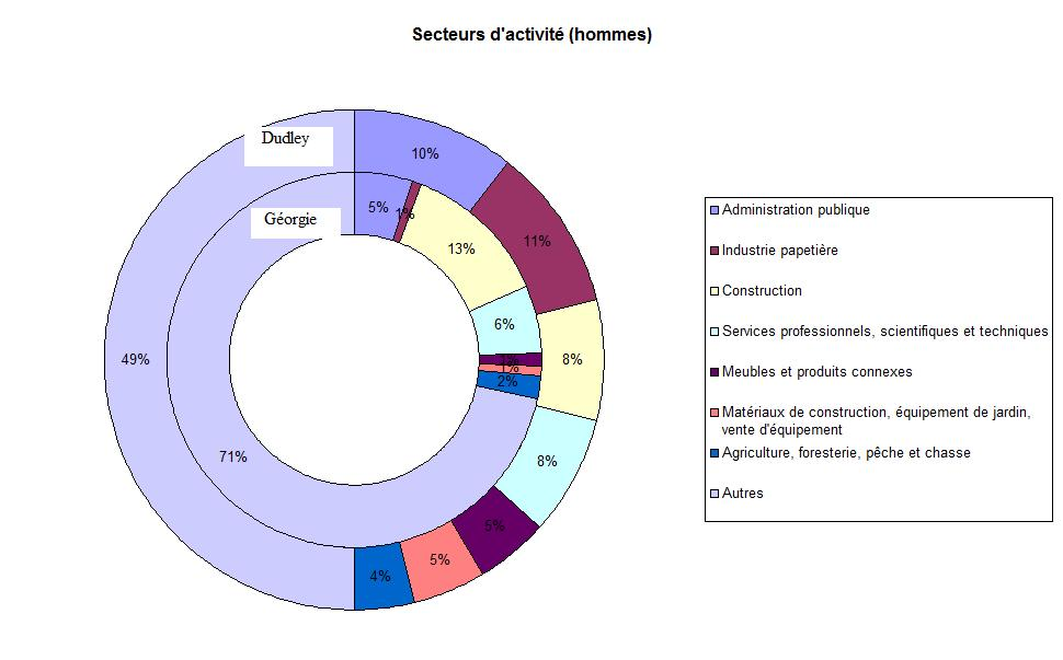 Répartition de l'emploi masculin selon le secteur d'activité à Dudley (Géorgie, Etats-Unis)